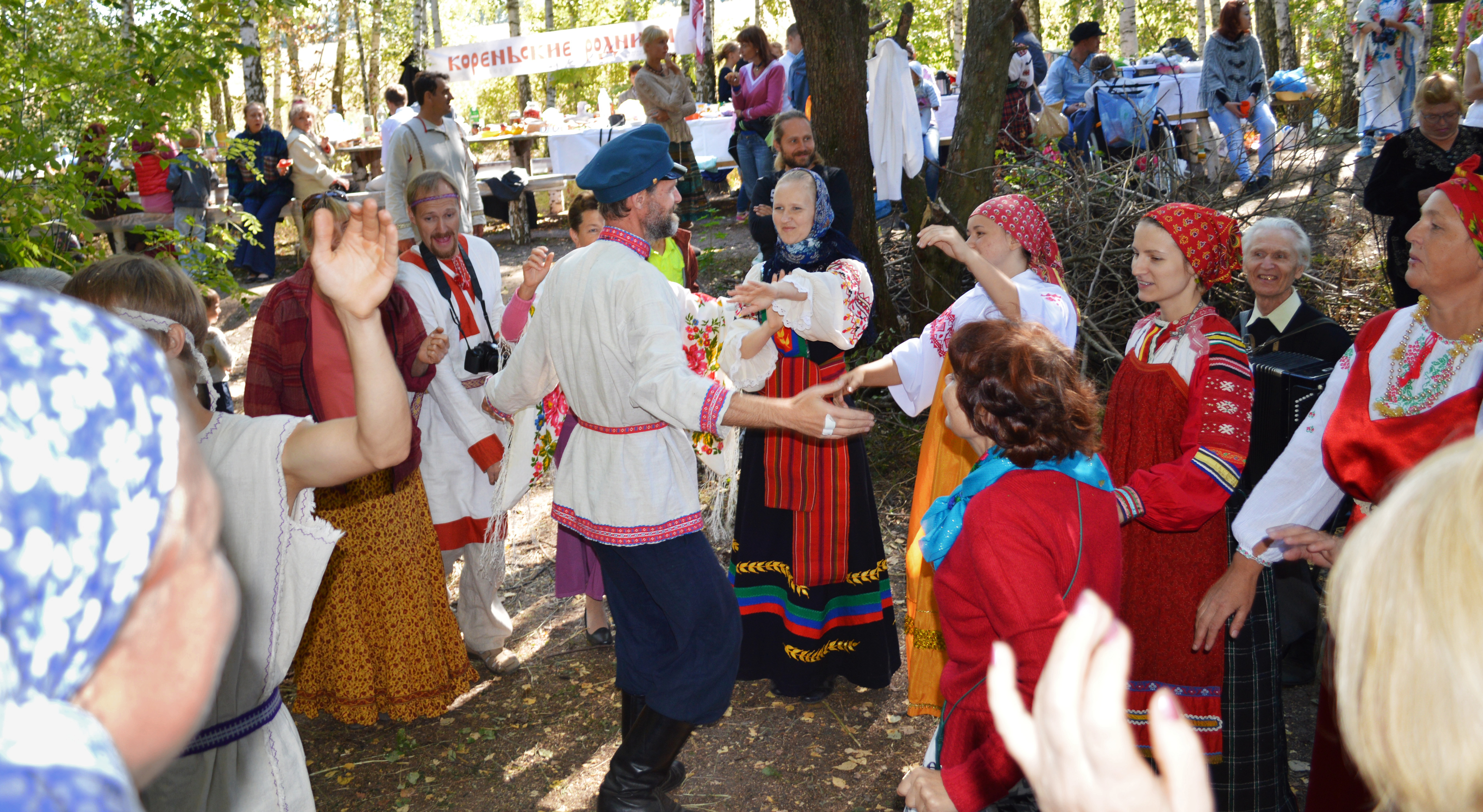 Пляска. Праздник встречи осени (Осенины) в родовом экопоселении «Кореньские родники». Белгородская область, 2014.